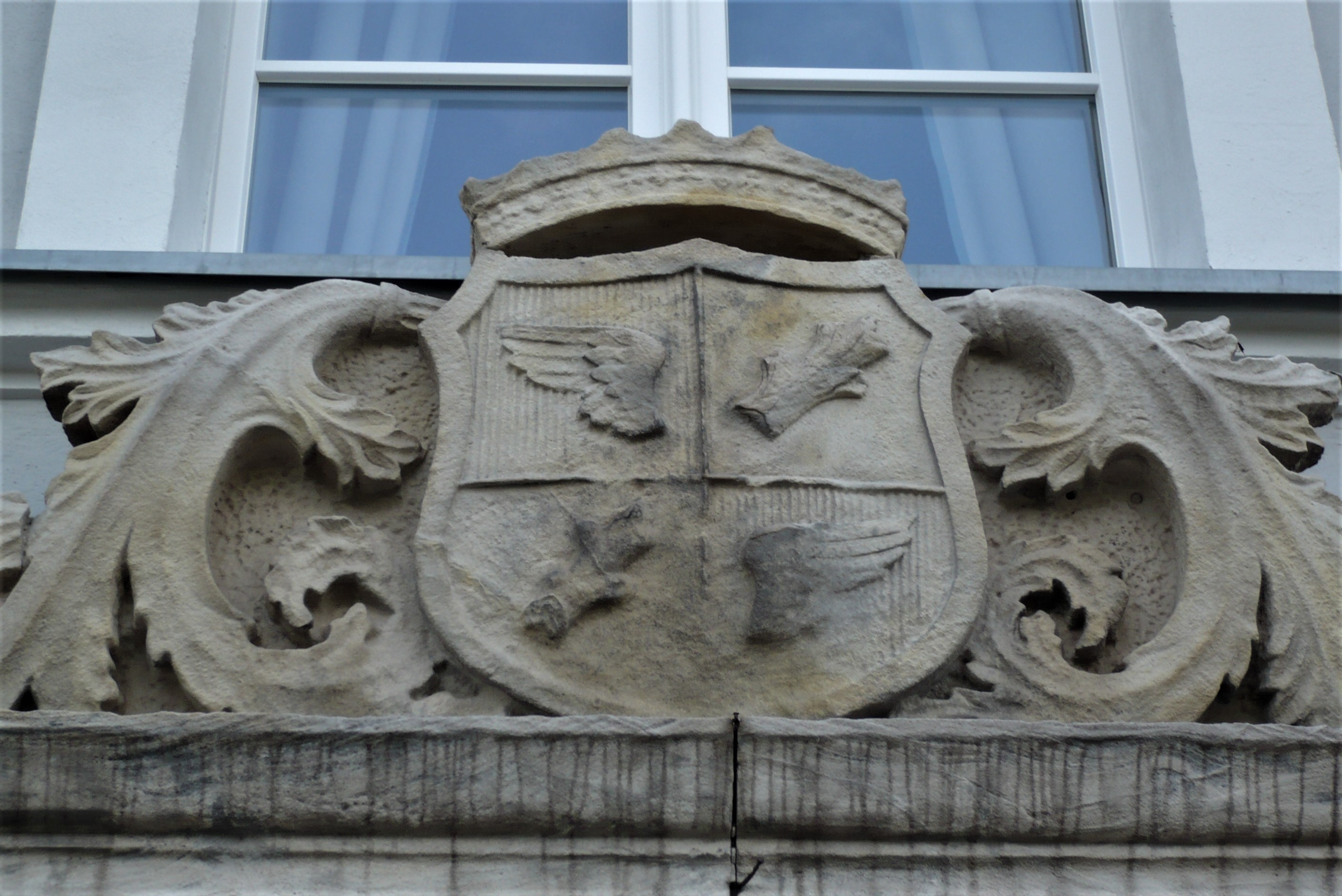 Kamieniec.Kartusz